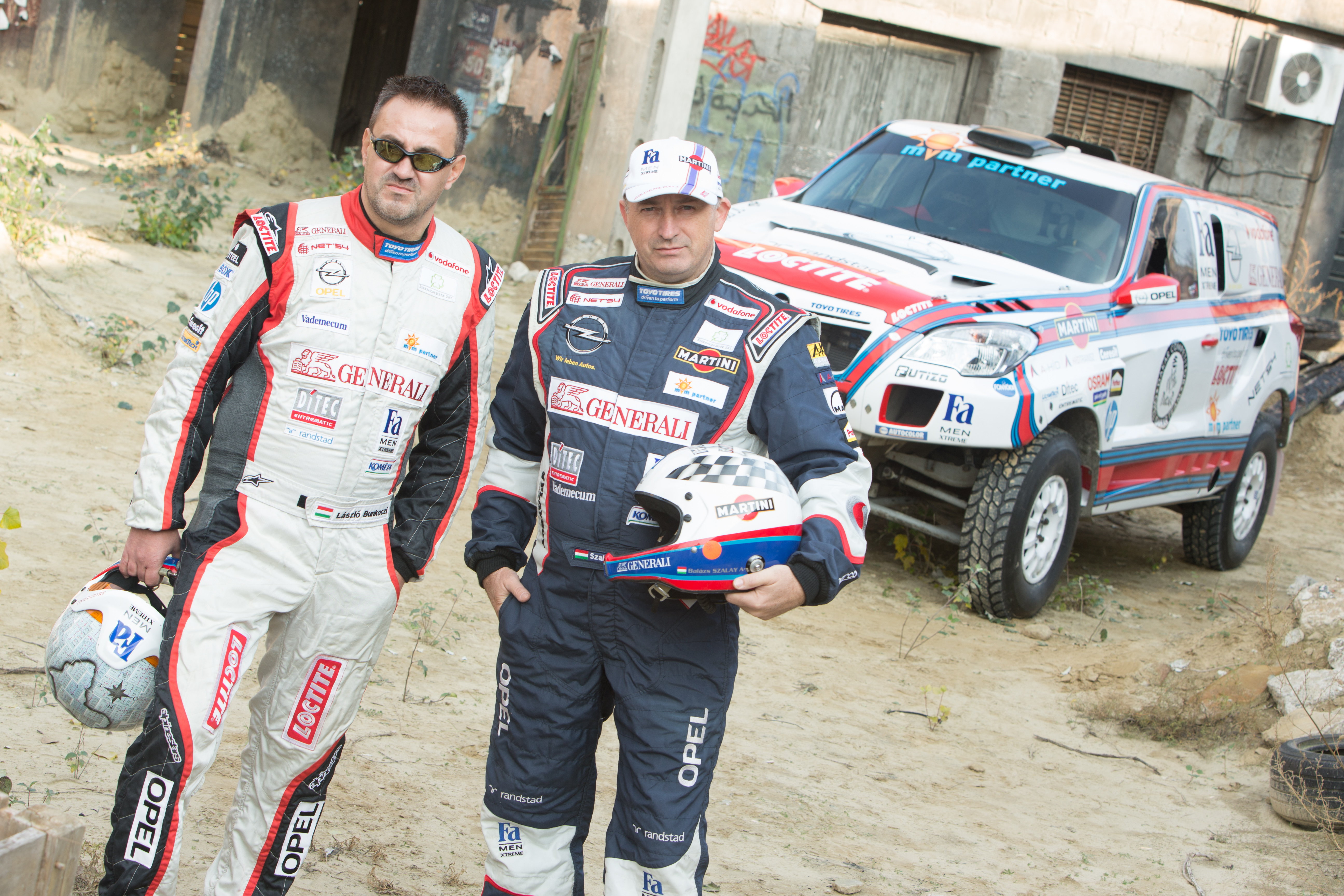 2015 új csapat design